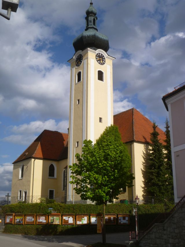 Kath. Pfarrkirche hl. Georg